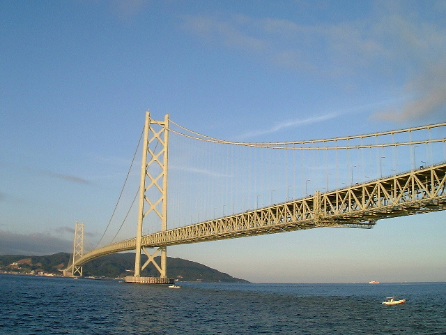 Akashi-Bridge